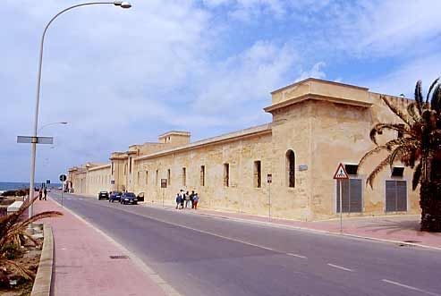 scattata da me